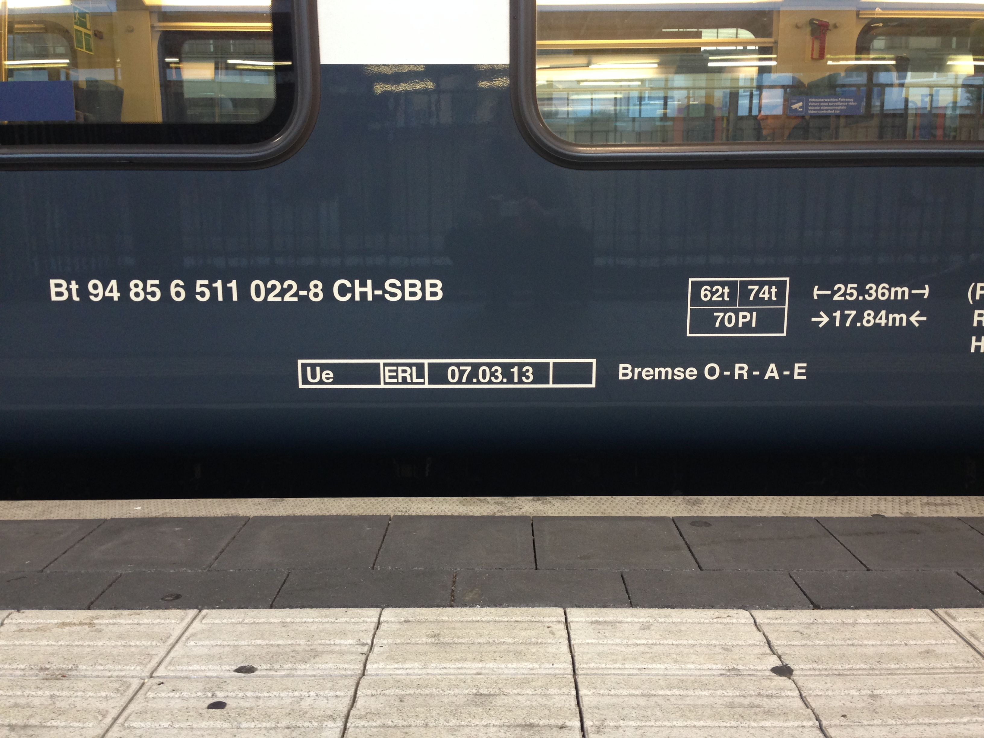 Anschrift mit TSI-Nummer am letzten Wagen (Steuerwagen) von Triebzug 511 Nr. 022 der SBB